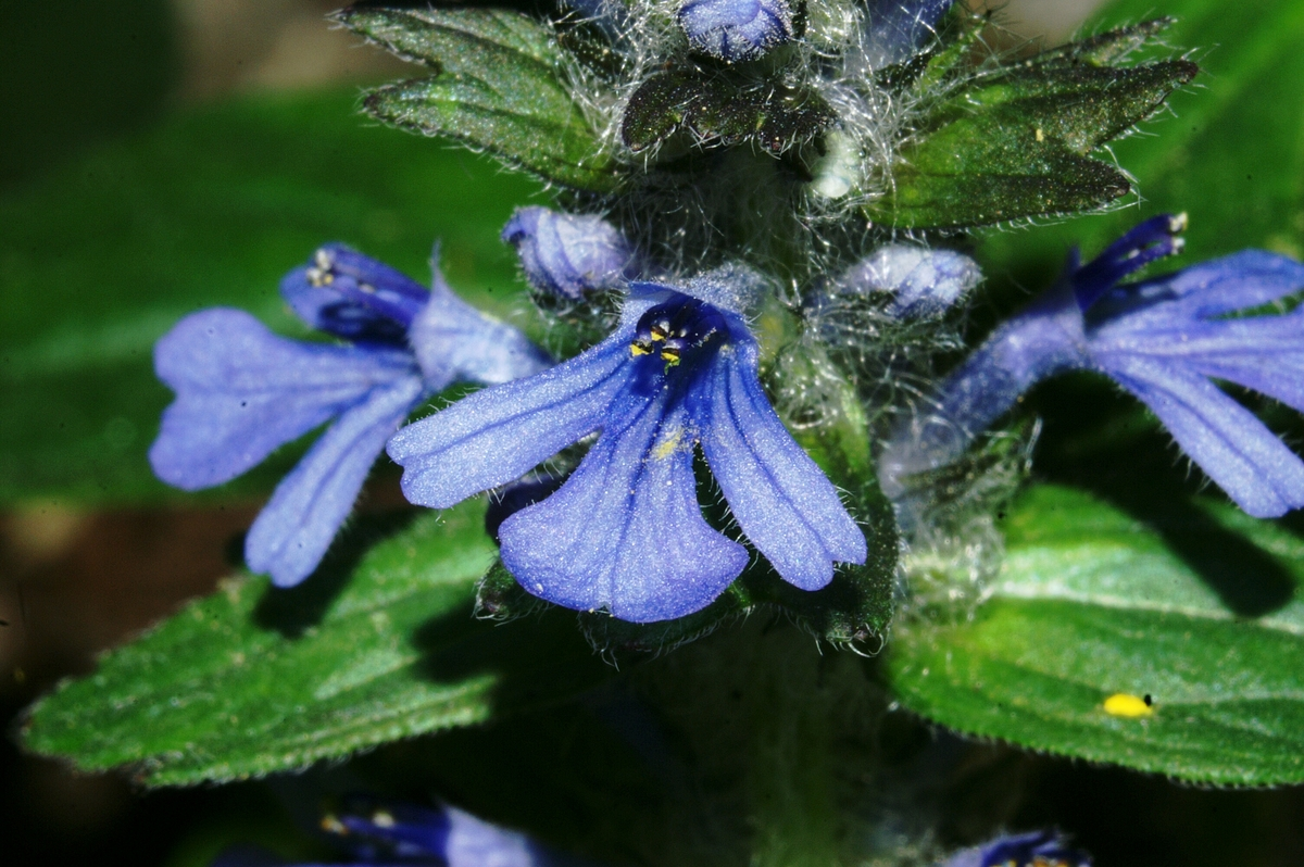 Dlakavi skrečnik v Otlici.